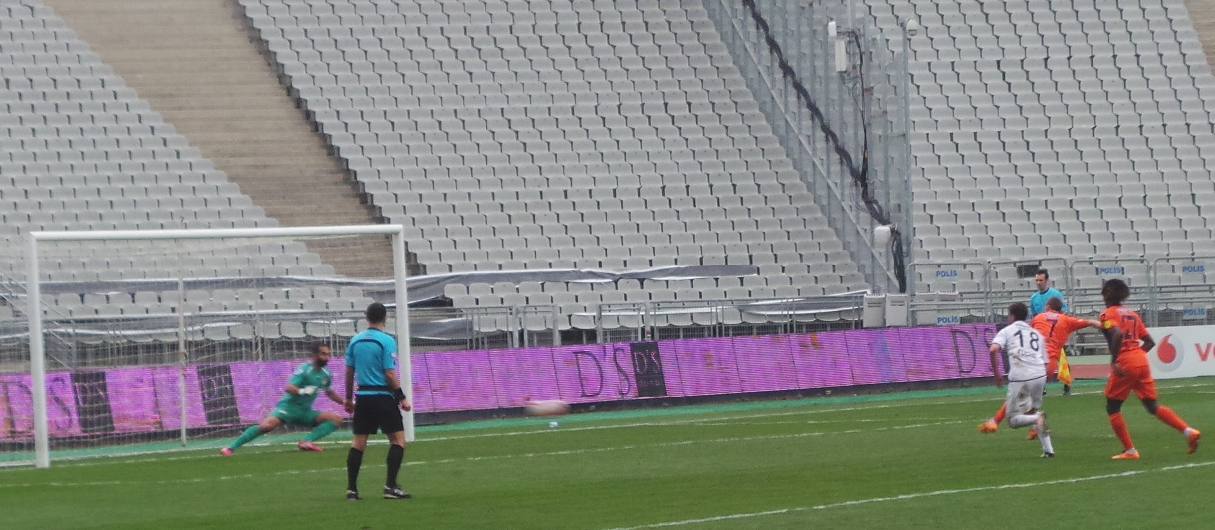 Esin Visca'nın Manisaspor'a attığı penaltı golü